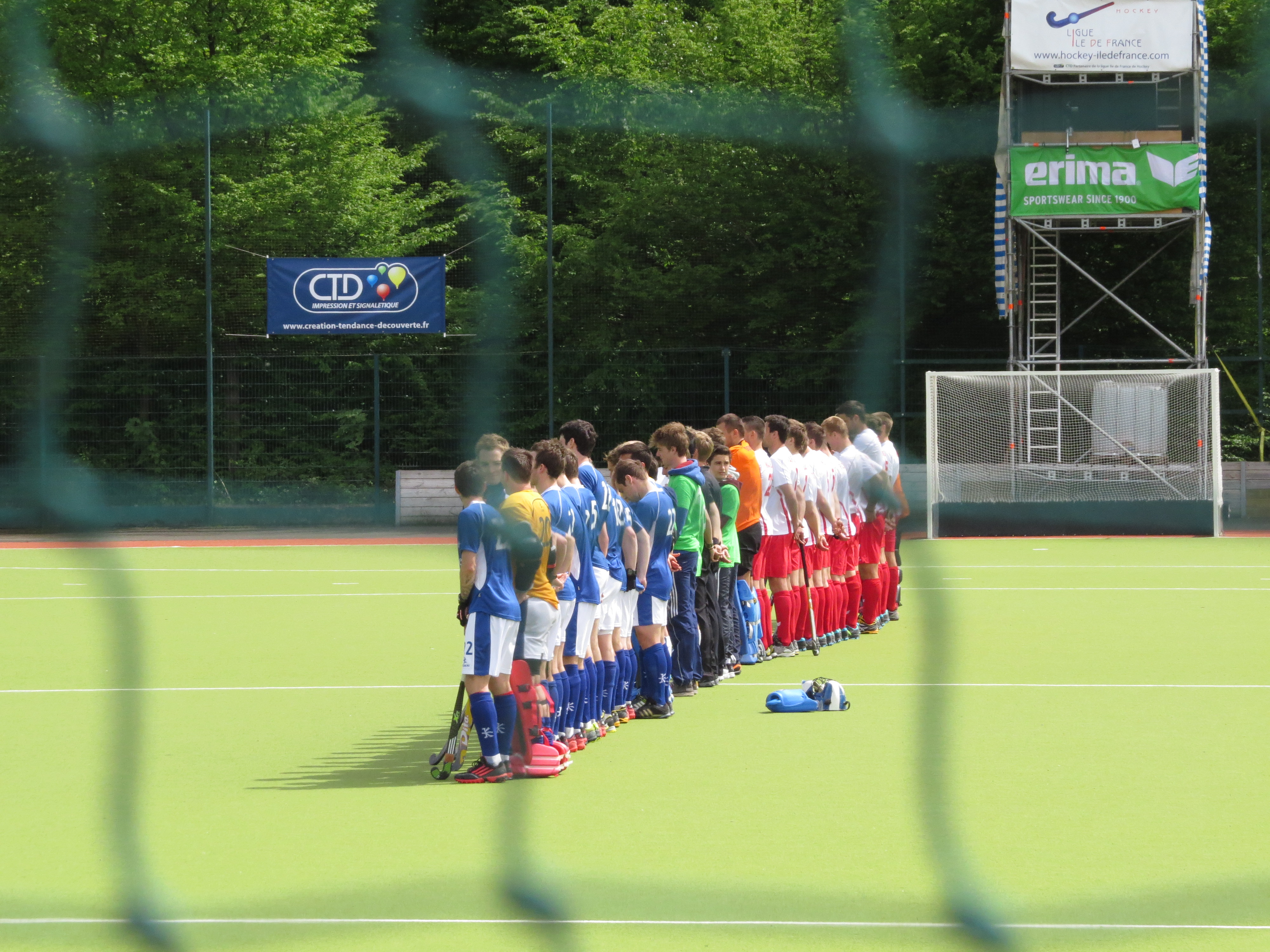 Pologne 3–3 Écosse Victoire de l’Écosse 4-3 aux tirs aux buts